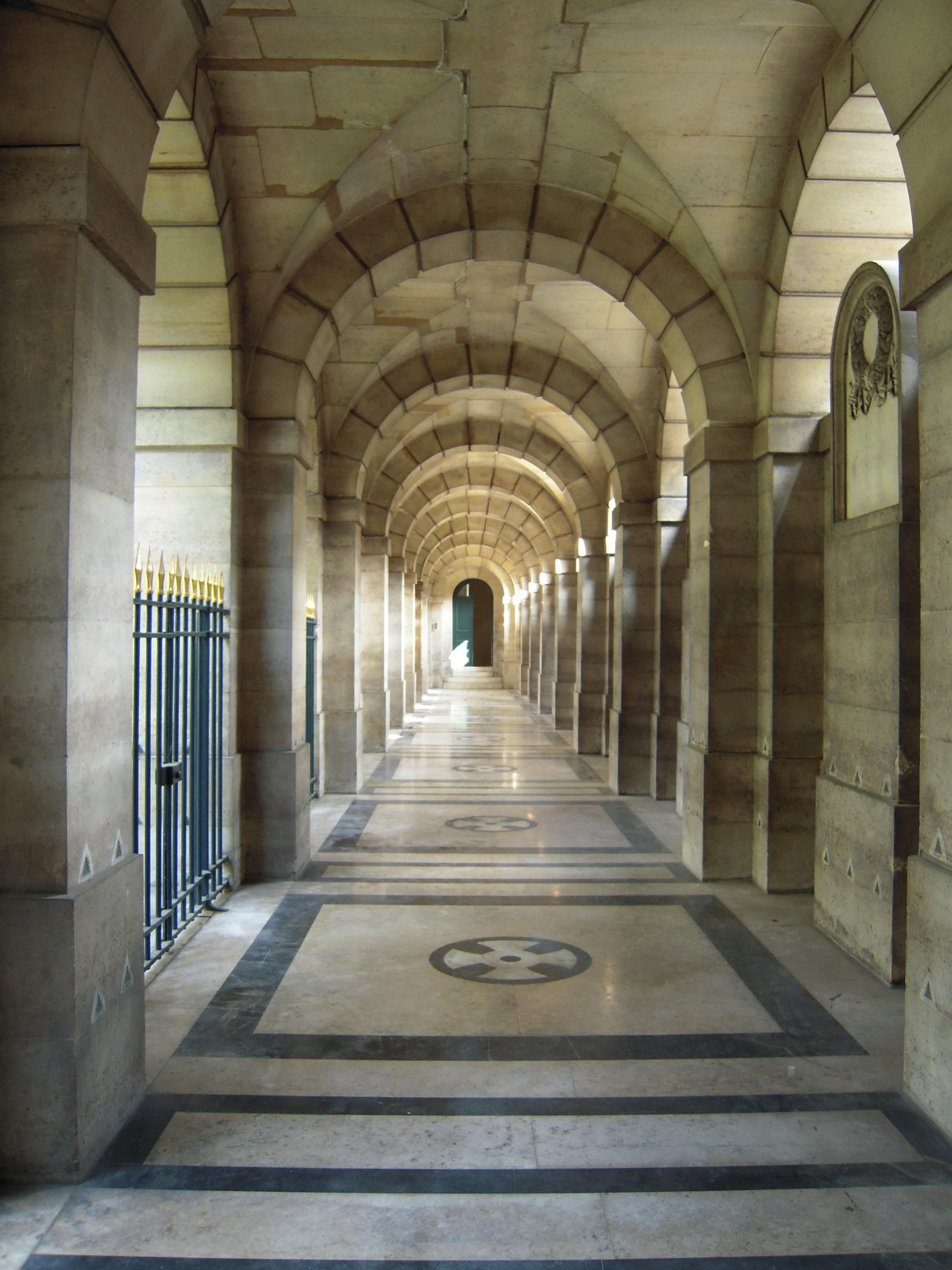 Paris Chapelle expiatoire - Voute de la galerie latérale